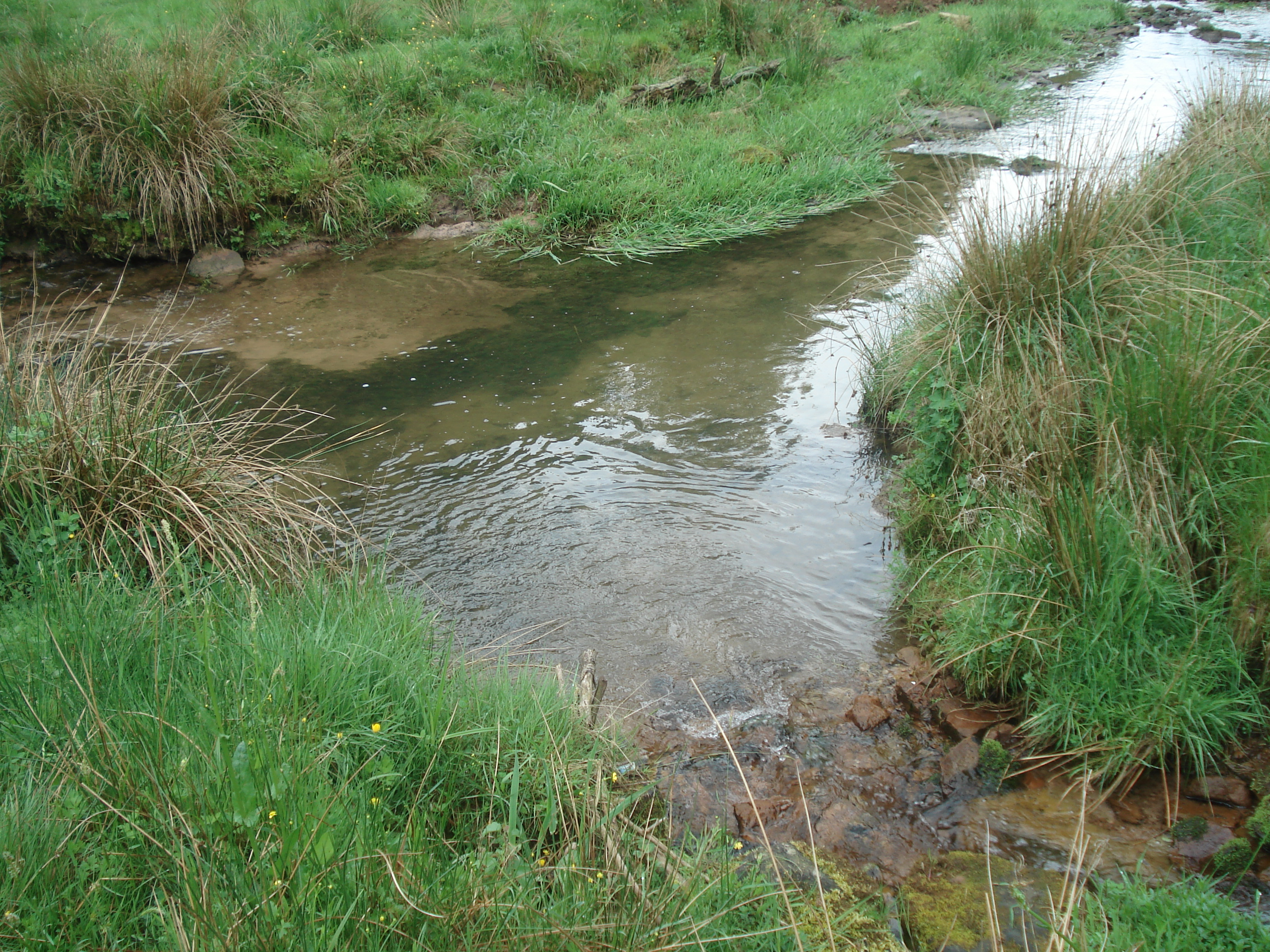 Der Breitbach (vorne rechts) mündet in die Hafenlohr (von links nach hinten rechts)